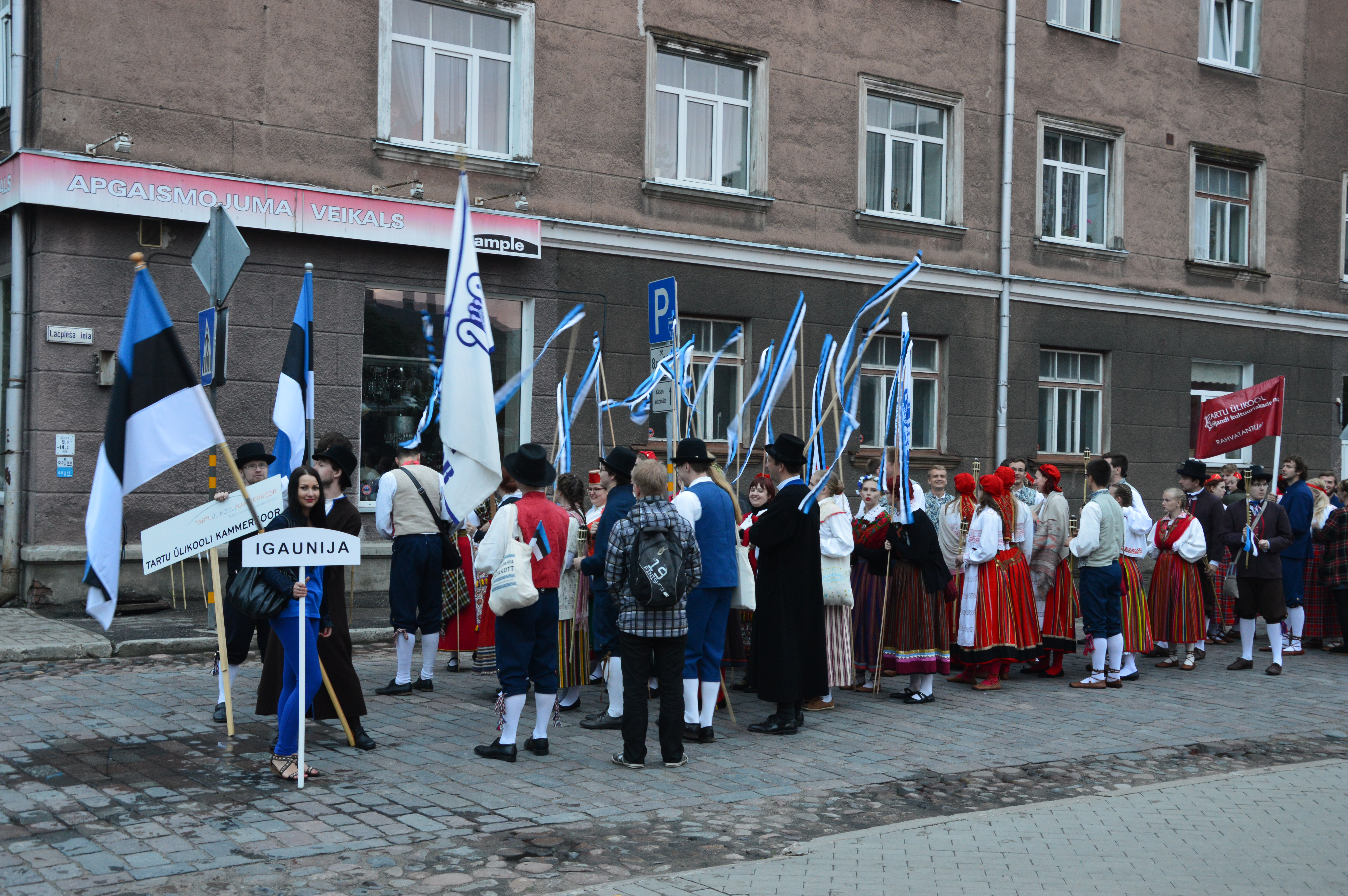 Eesti rühmad Gaudeamusel. Rongkäigu esimene ots.